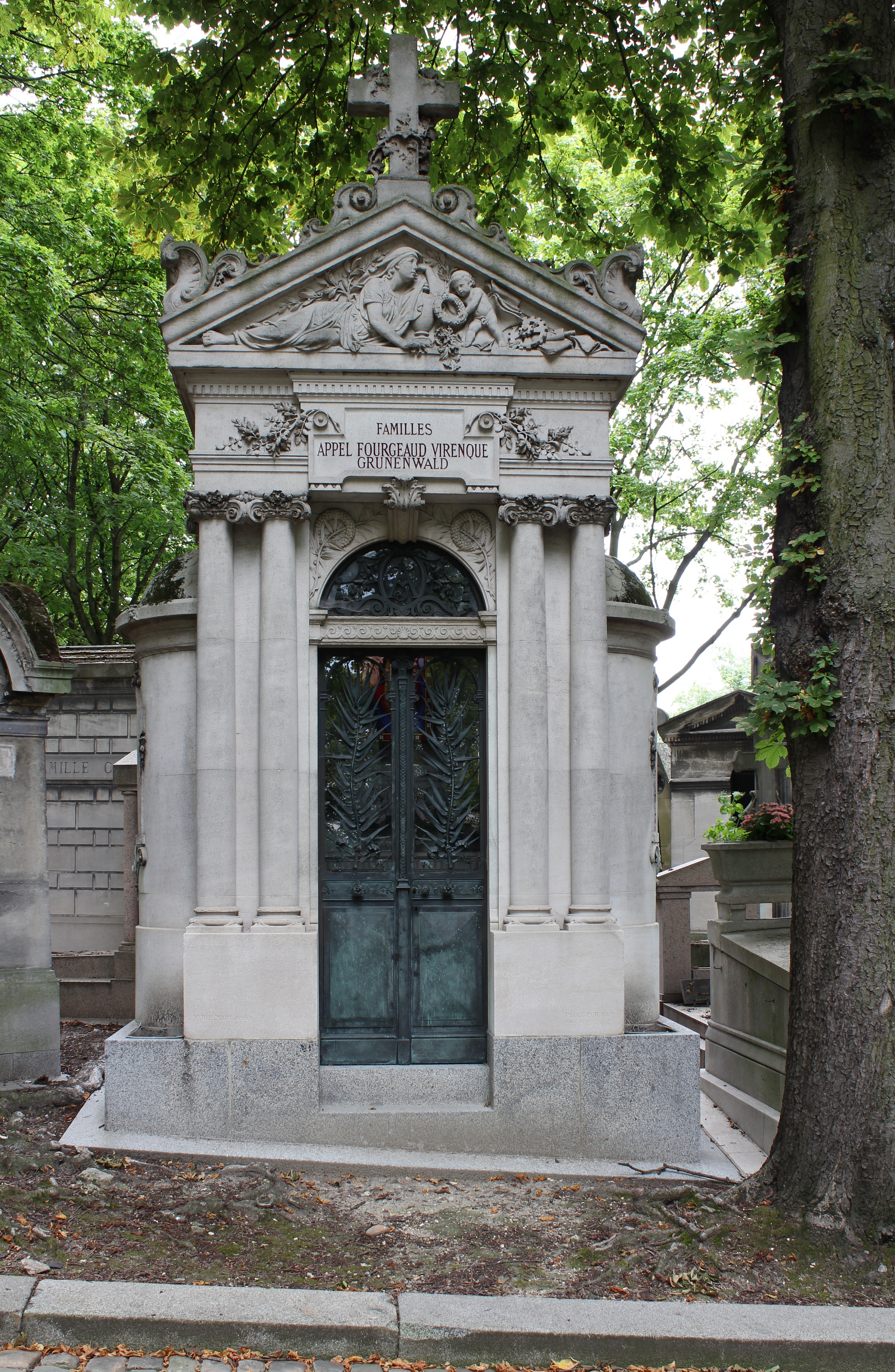 Sépulture de François-Antoine Appel (1821-1882), imprimeur-lithographe ; Maurice Virenque (1888-1946), chirurgien de l'association des blessés de la face les "Gueules cassées" ; Jean-Jacques Grunenwald (1911-1982), organiste, improvisateur, compositeur, professeur et architecte français.